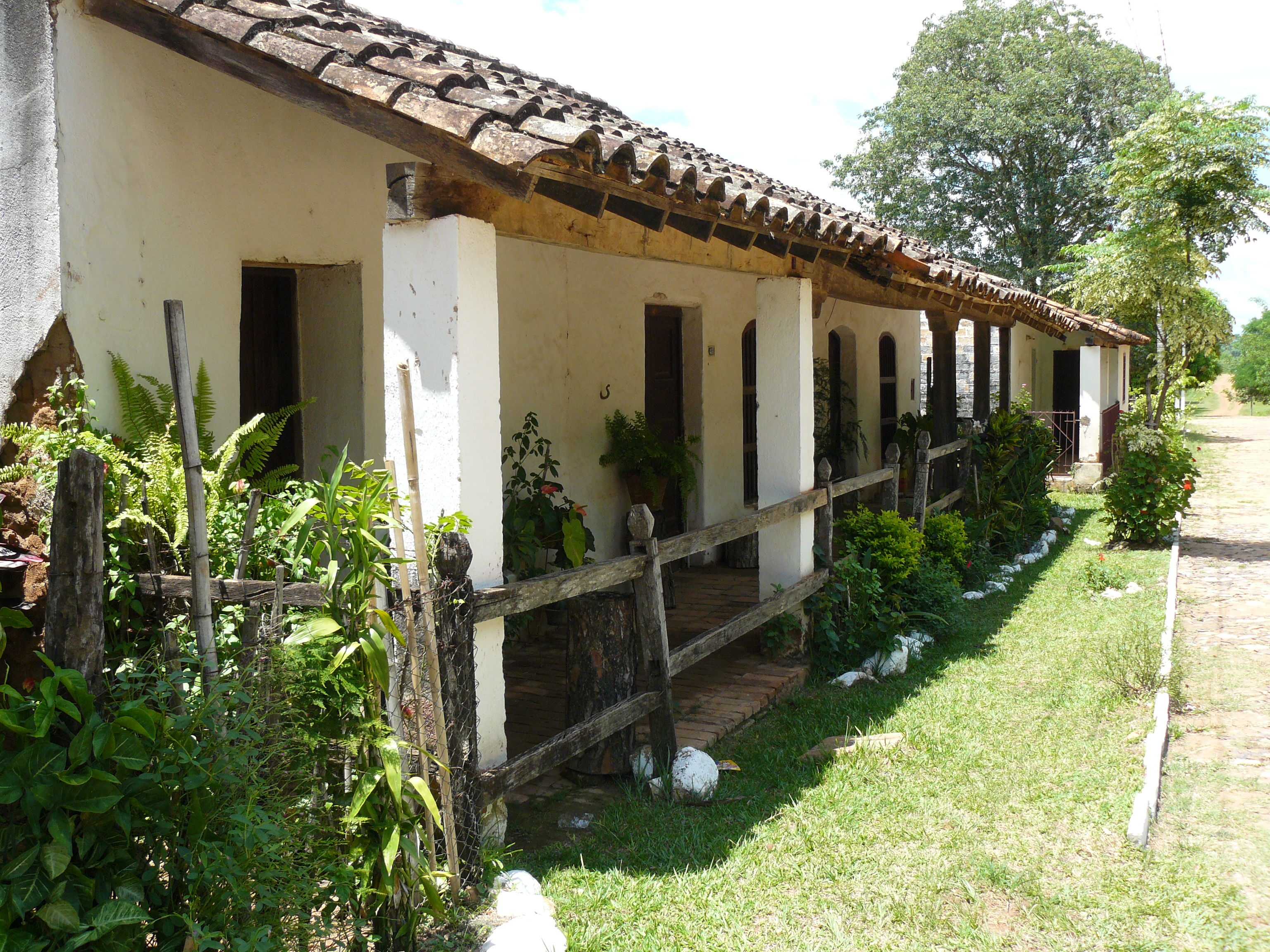 Casa antigua en Paraguay